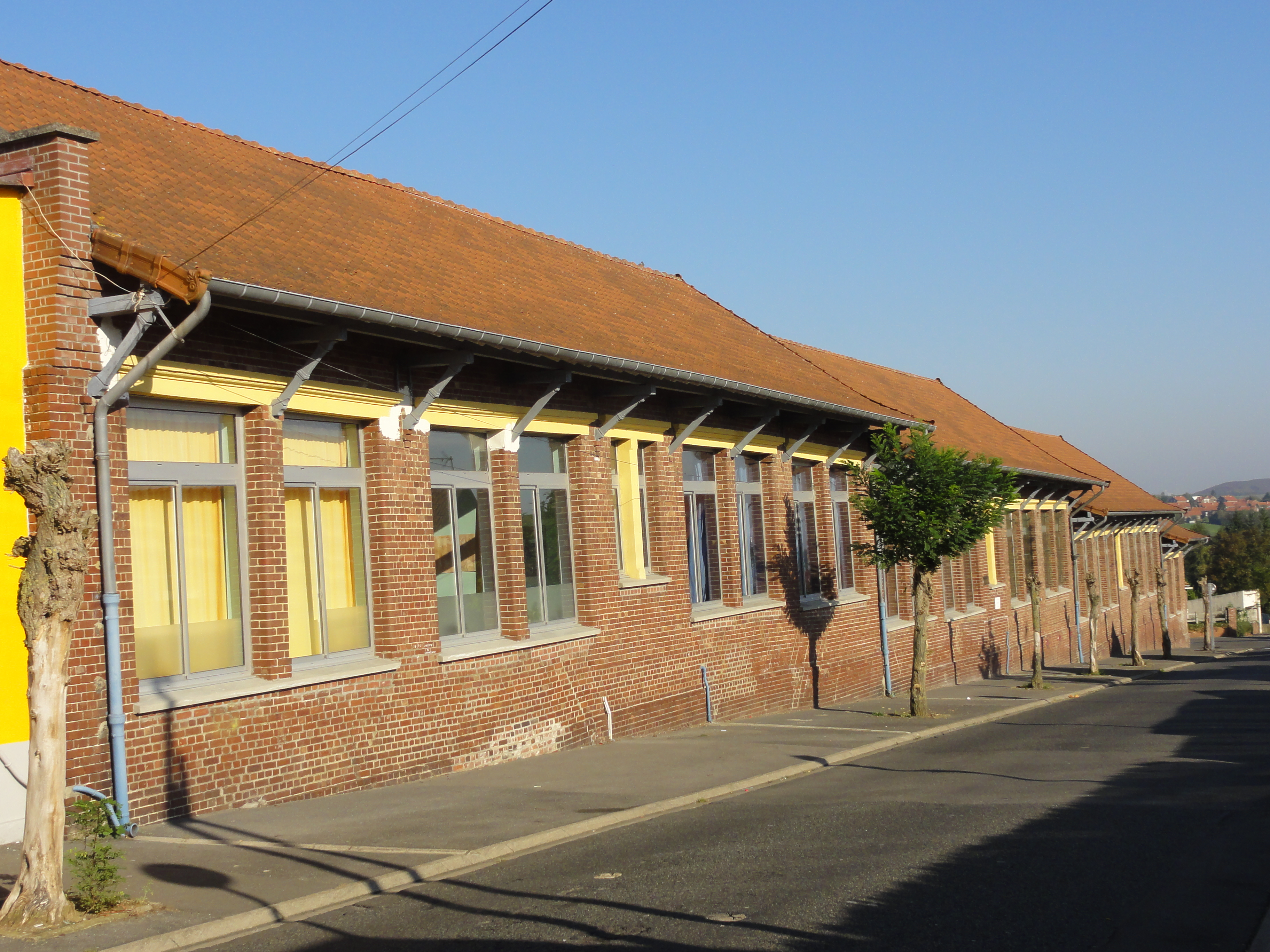 Écoles des cités de la fosse n° 6 bis - 6 ter de la Compagnie des mines de Marles dans le bassin minier du Nord-Pas-de-Calais, Calonne-Ricouart, Pas-de-Calais, Nord-Pas-de-Calais, France.